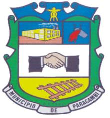 Brasão do município de Paracambi.